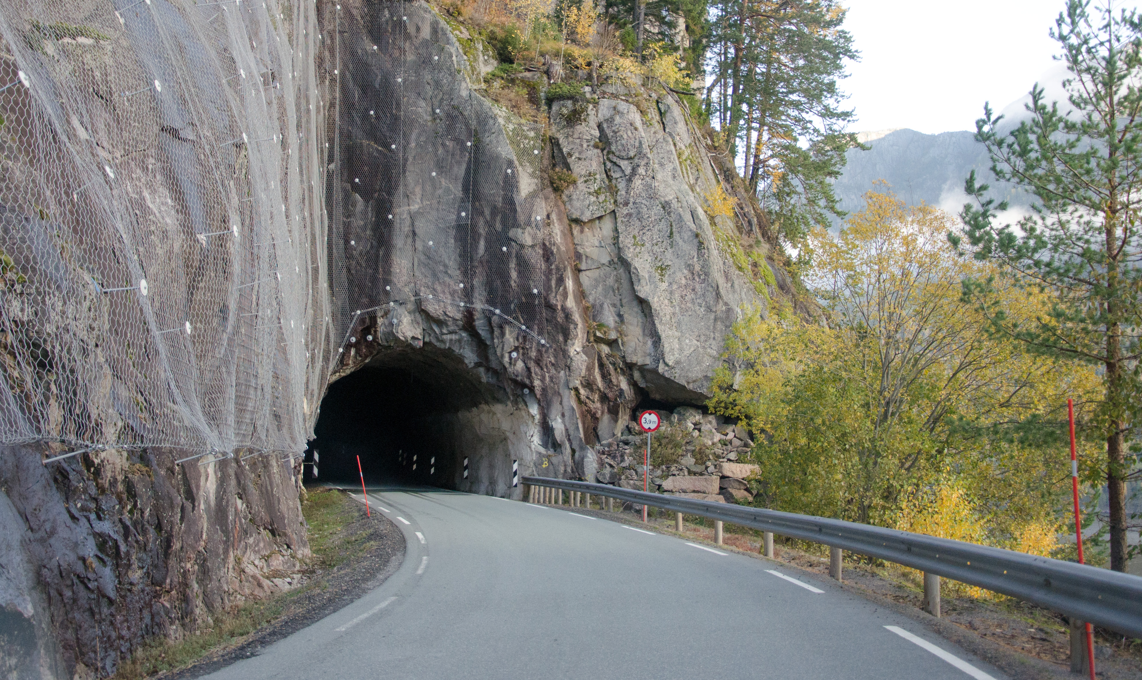 Fjågesundtunnelen på fv.304 i Kviteseid i Telemark